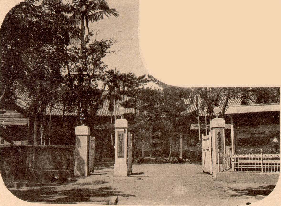 中文（台灣）: 台北地方法院宜蘭出張所，現址為法務部行政執行署宜蘭分署